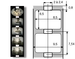 dimensions en mm du film 9,5mm